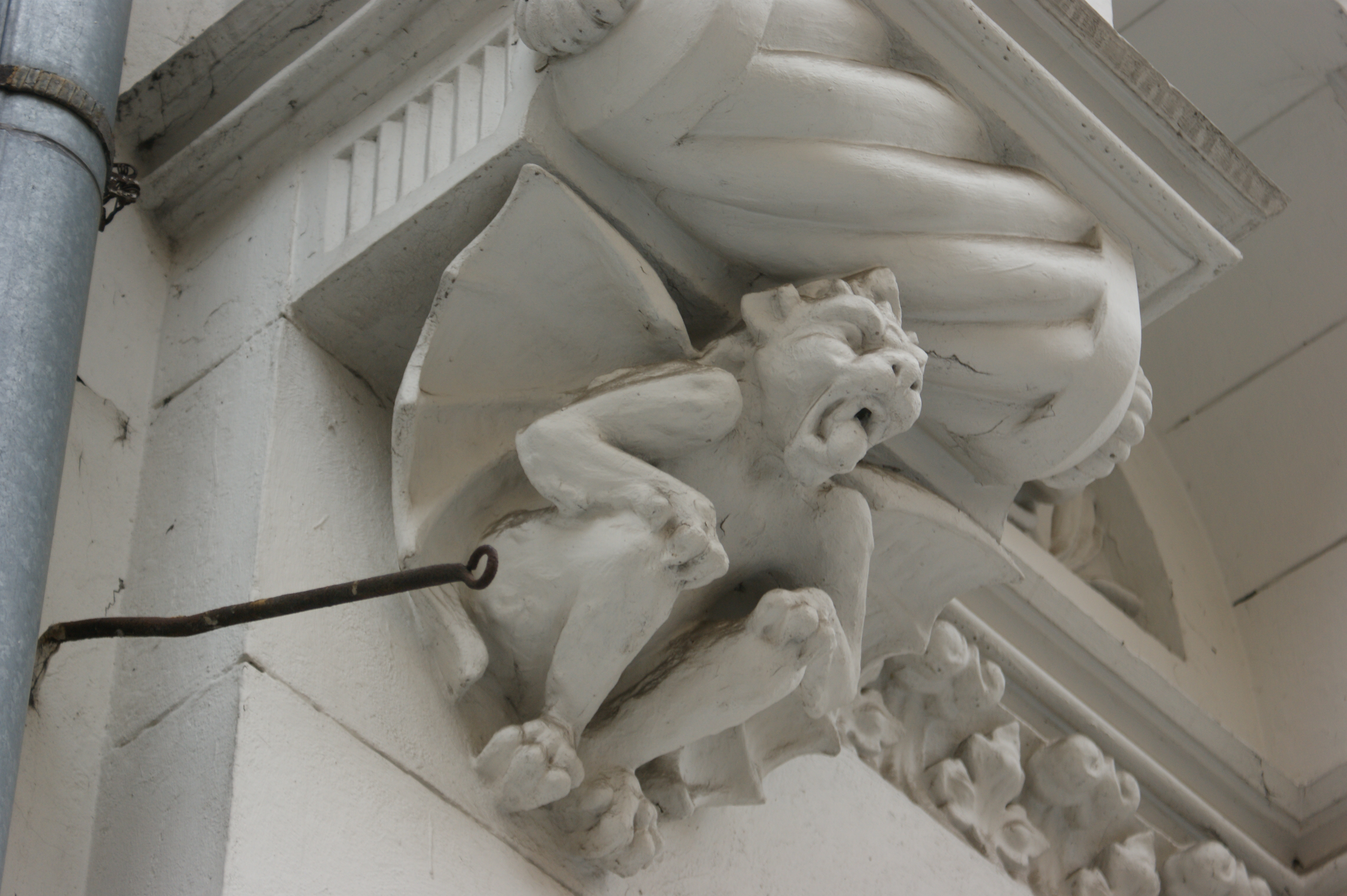 Żygacz